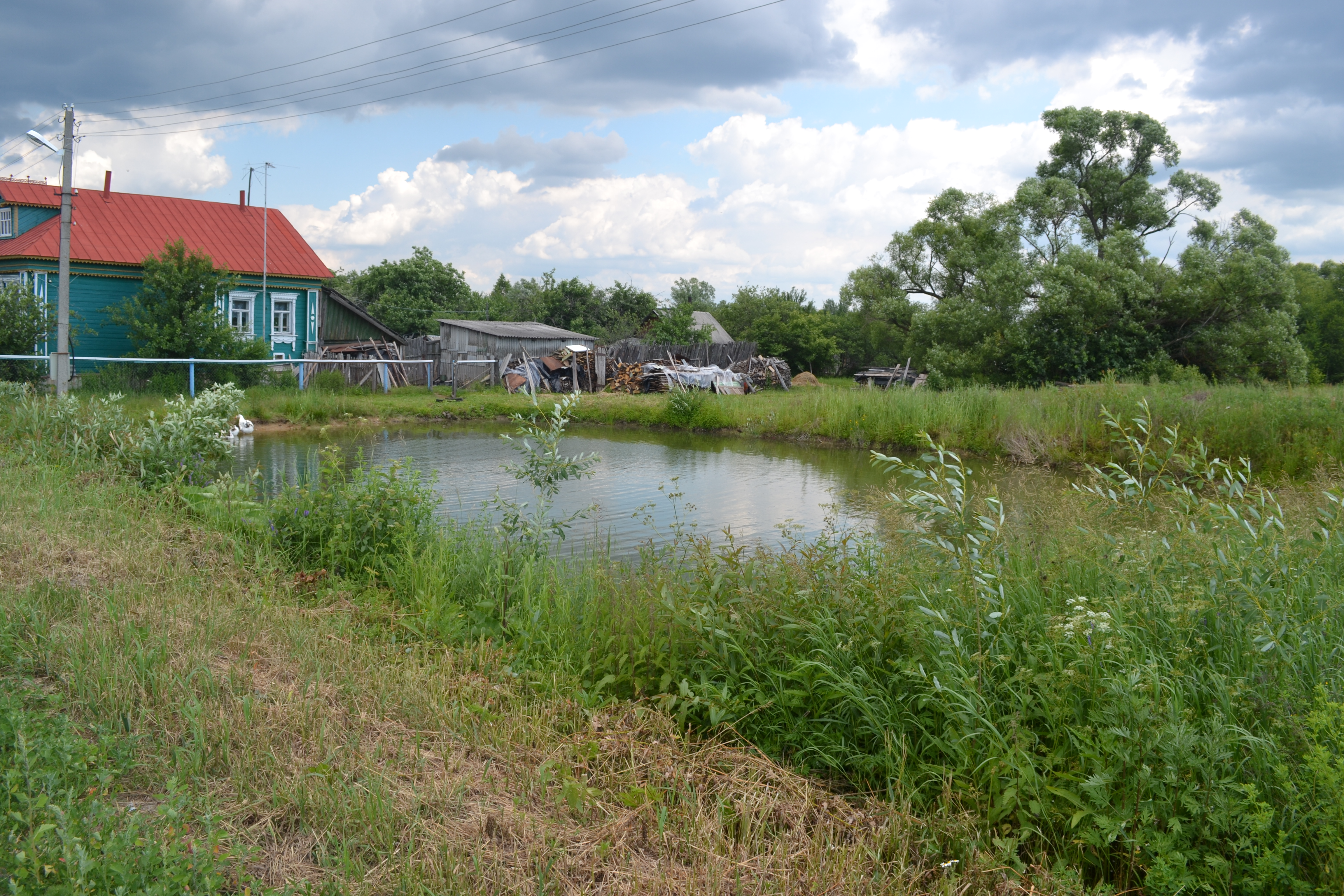 Пруд в деревне Якушевичи (Шатурский район)